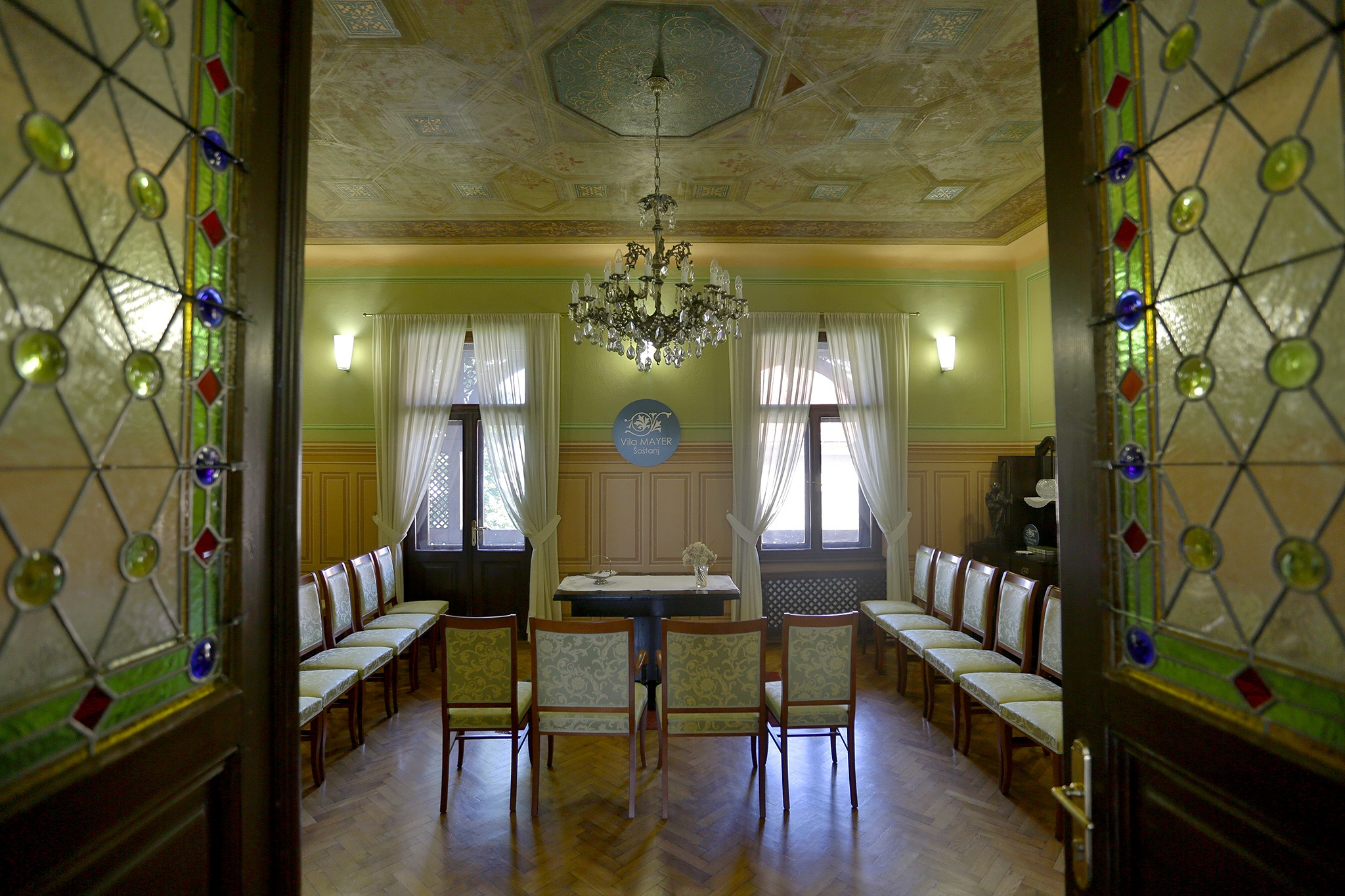 Vila Mayer-poročni salon